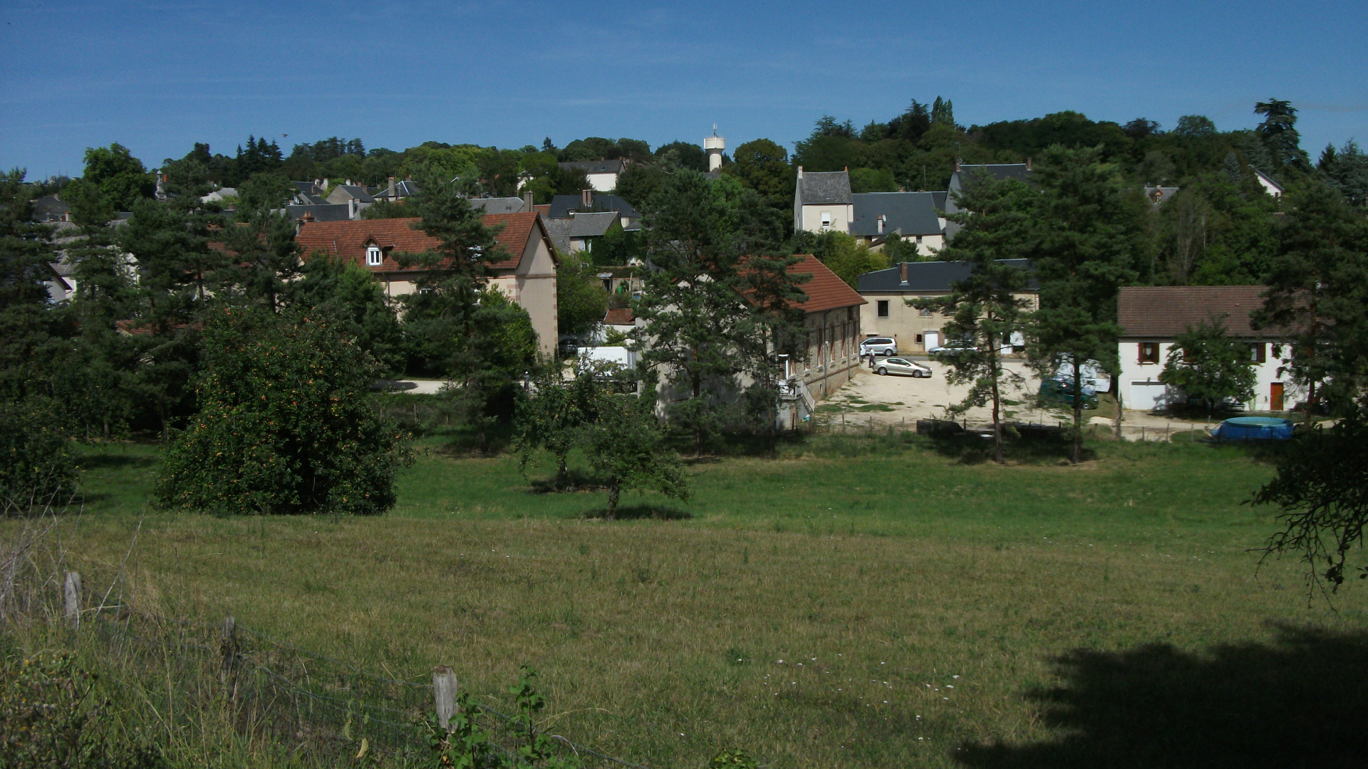 Une vue générale de la commune de Menetou-Salon depuis la rue de la Gare en venant de Quantilly.